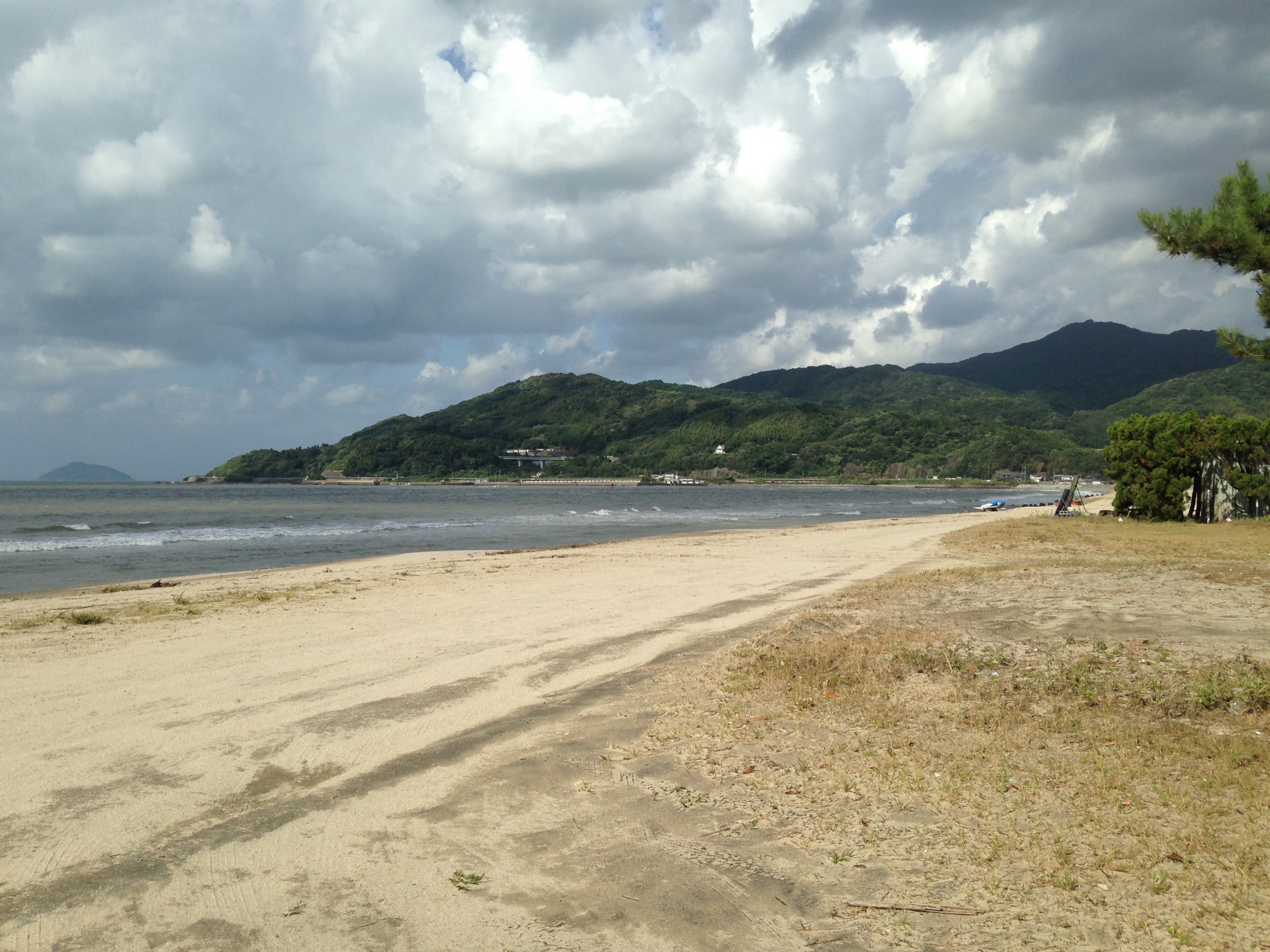 浜崎海水浴場より望む十坊山と姫島